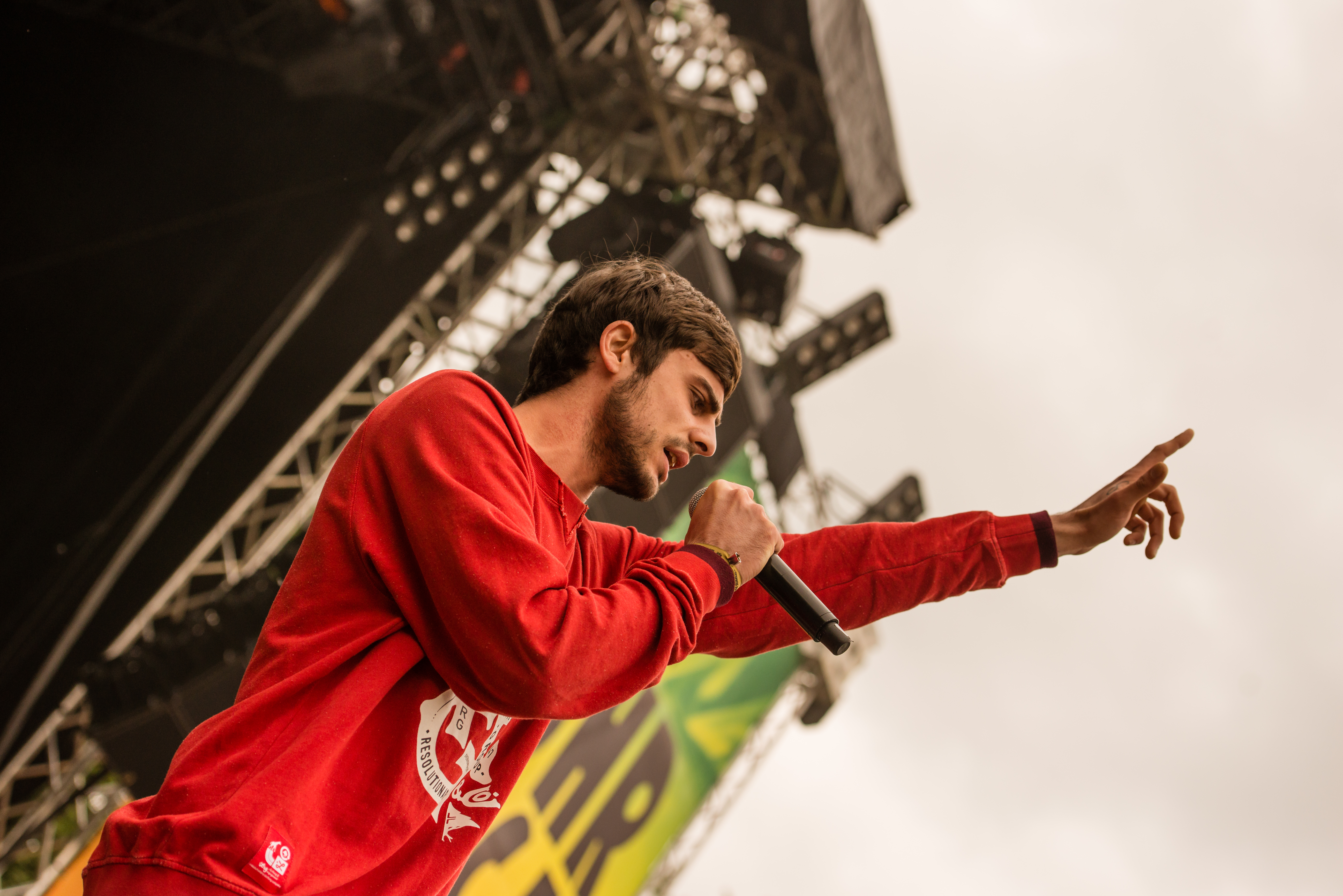 'Ruhr Reggae Summer 2014 - Dortmund': 'Miwata'